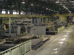 Производство резервуаров